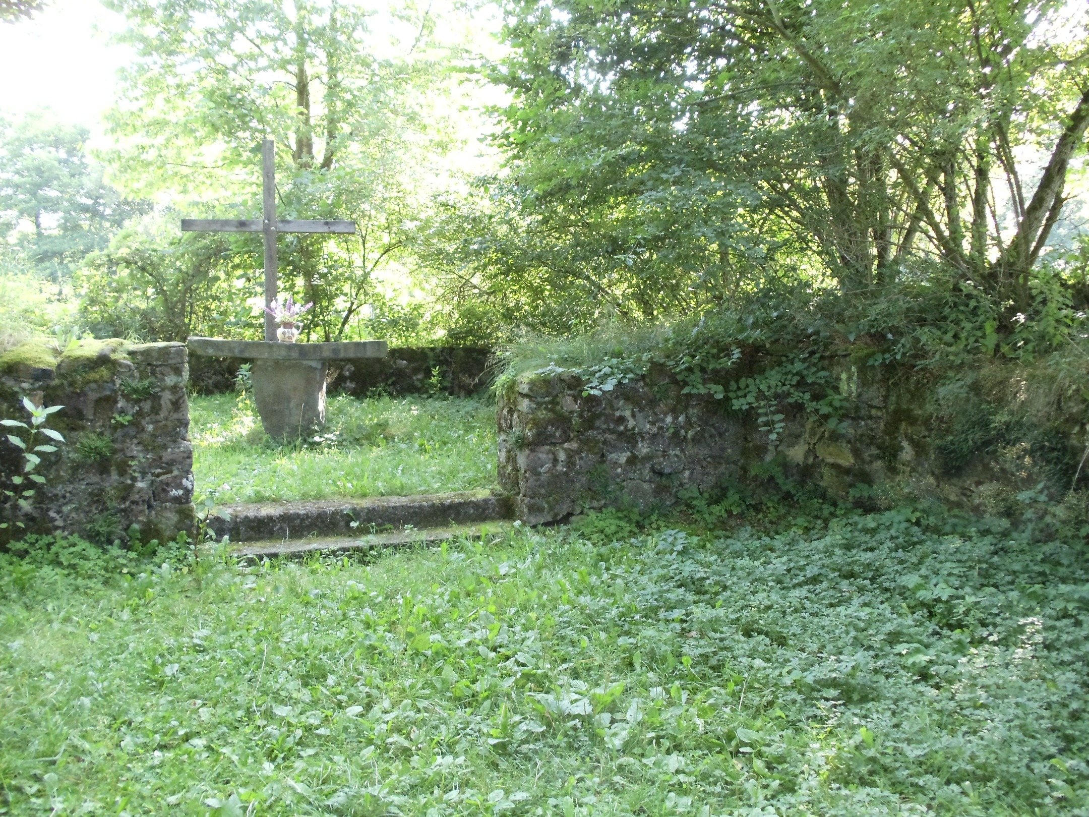 Marcellinuskappelle, Aufnahme von der hinteren Wand aus, auf den Altarraum blickend